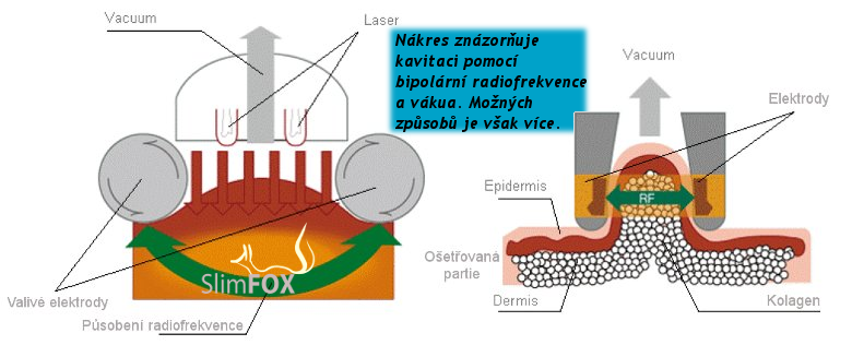 Princip ultrazvukové liposukce používané v zeštíhlovacím studiu